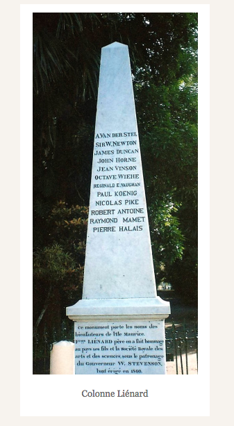 Colonne Liénard au jardin botanique de Pamplemousse (Île Maurice)